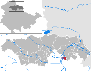 Etzleben in Thuringia - Kyffhäuserkreis